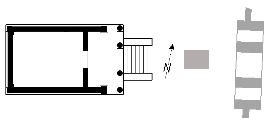 Plan des Augustus-Tempels von Philae nach Borchardt, JDI 1903